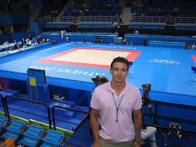 Carlos Carbonell en el pabellon de Atenas 2004